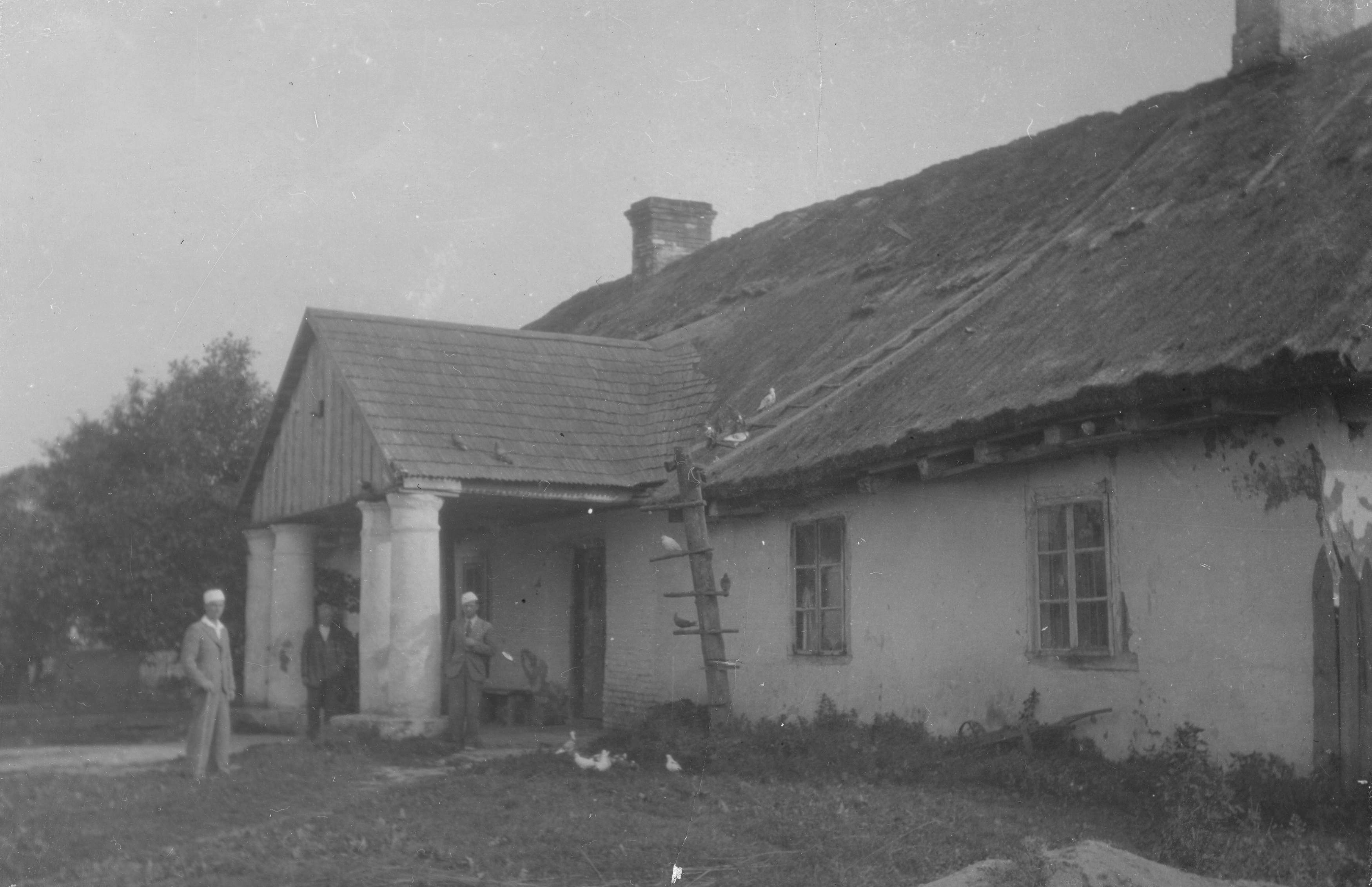 Беларуская (тарашкевіца): Дастоева (Dastojeva), сядзіба Дастаеўскіх (Dastajeŭski)